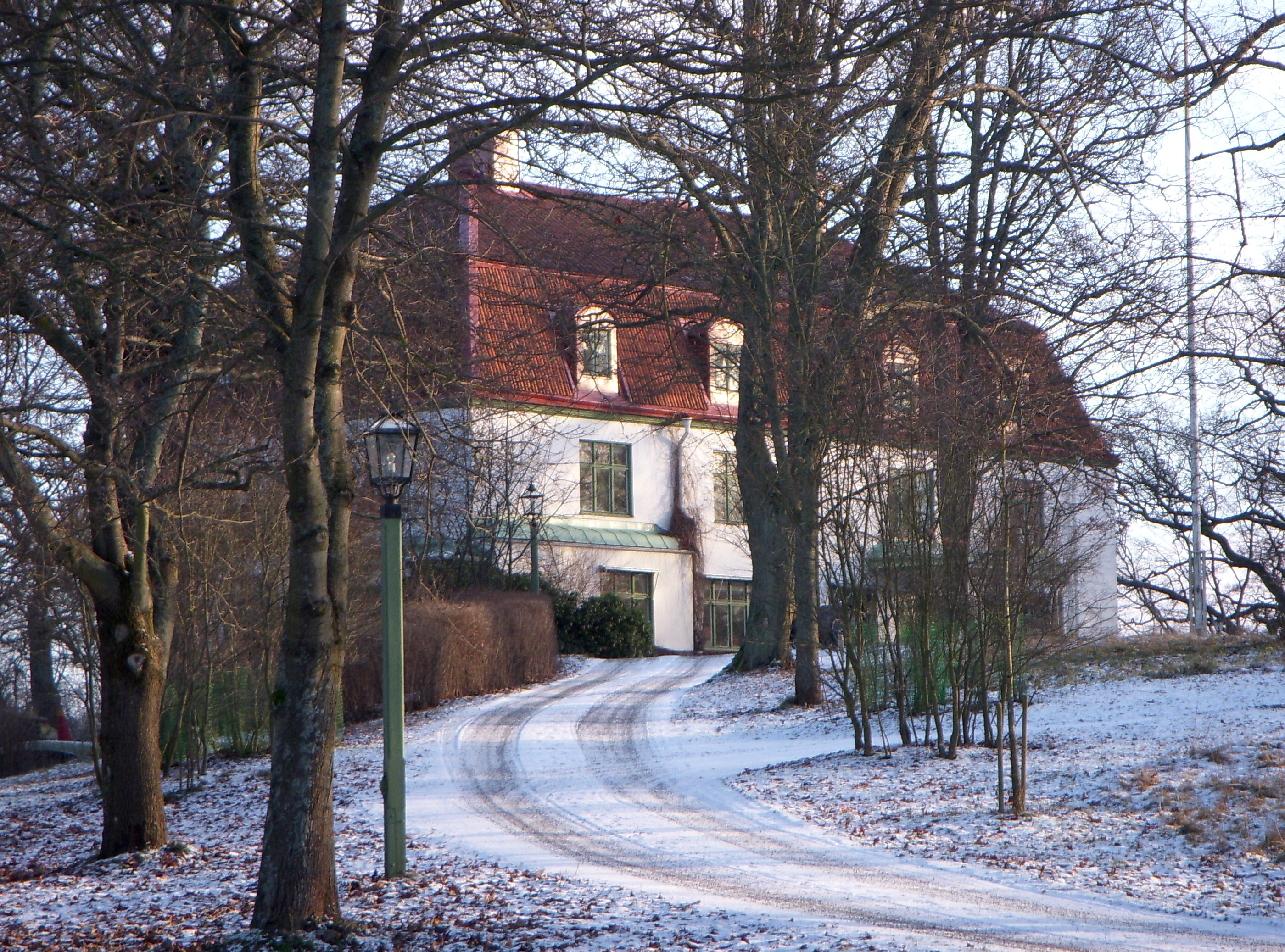 Parkudden på Djurgården, Stockholm